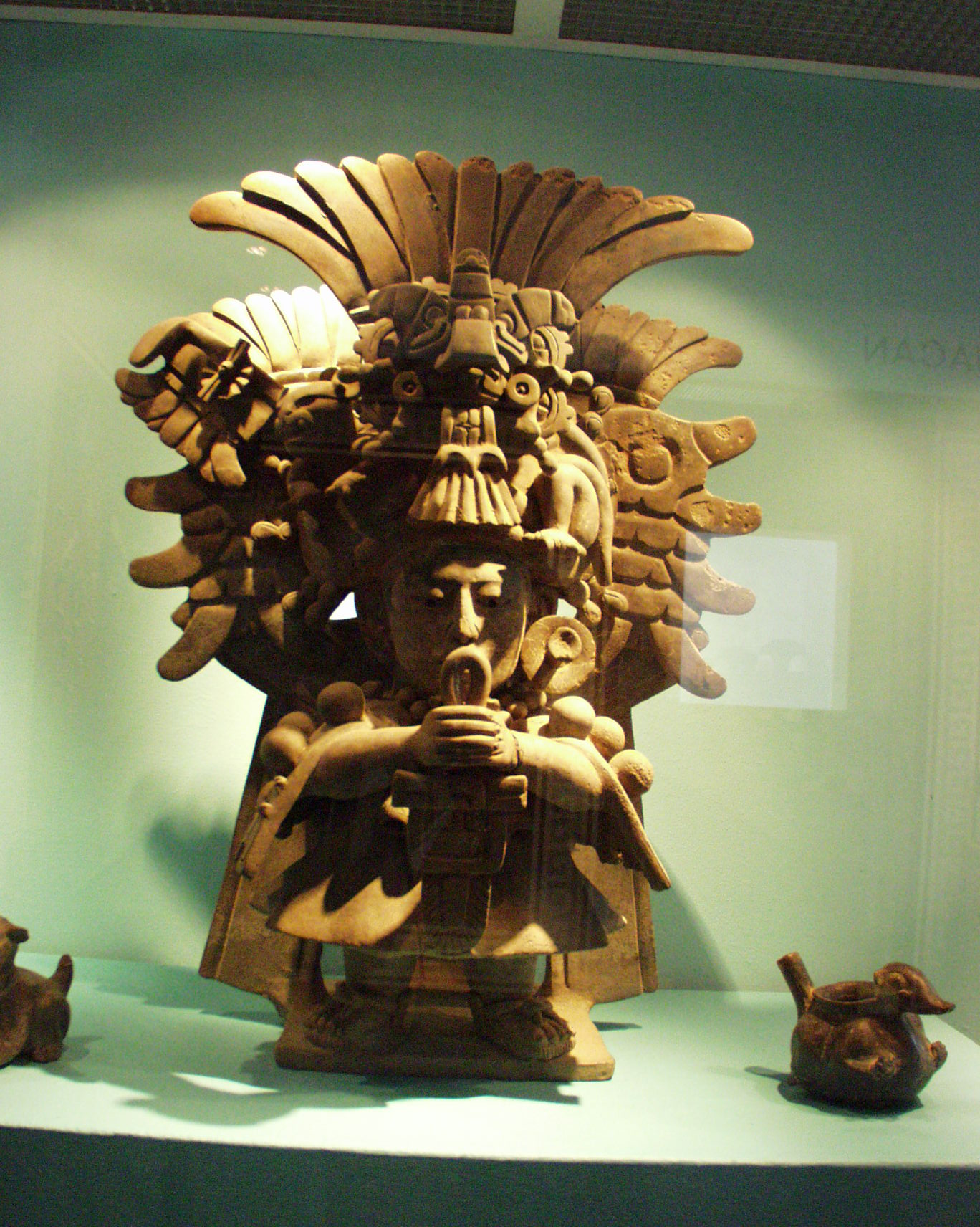 Amparo Museum in Puebla, Mexico.